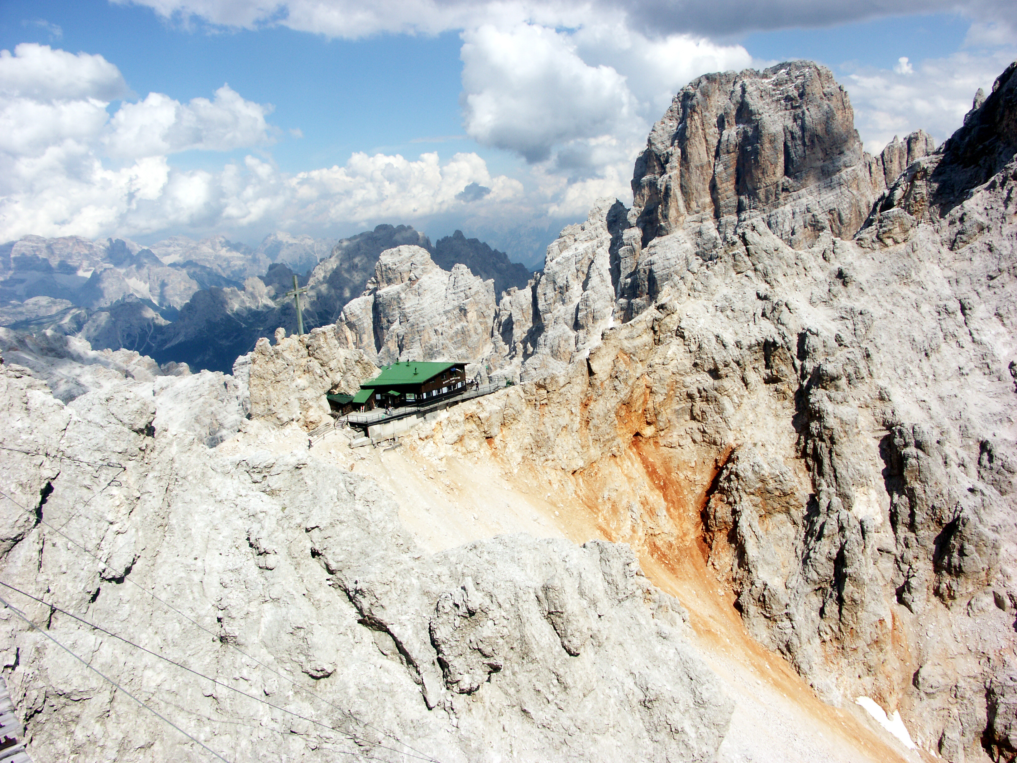 Rifugio Lorenzi am Monte Cristallo (3.000 m)